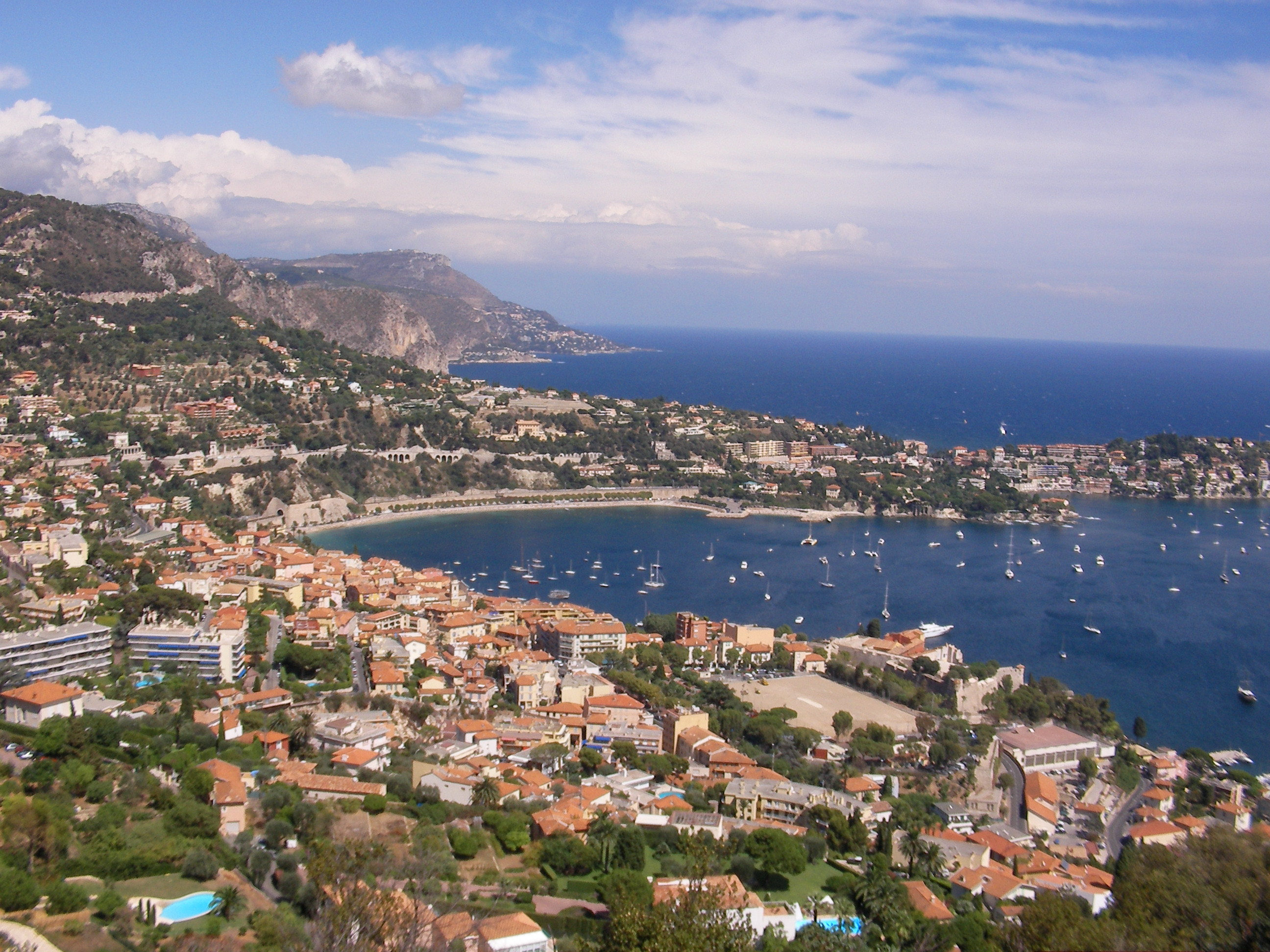 Villefranche-sur-Mer